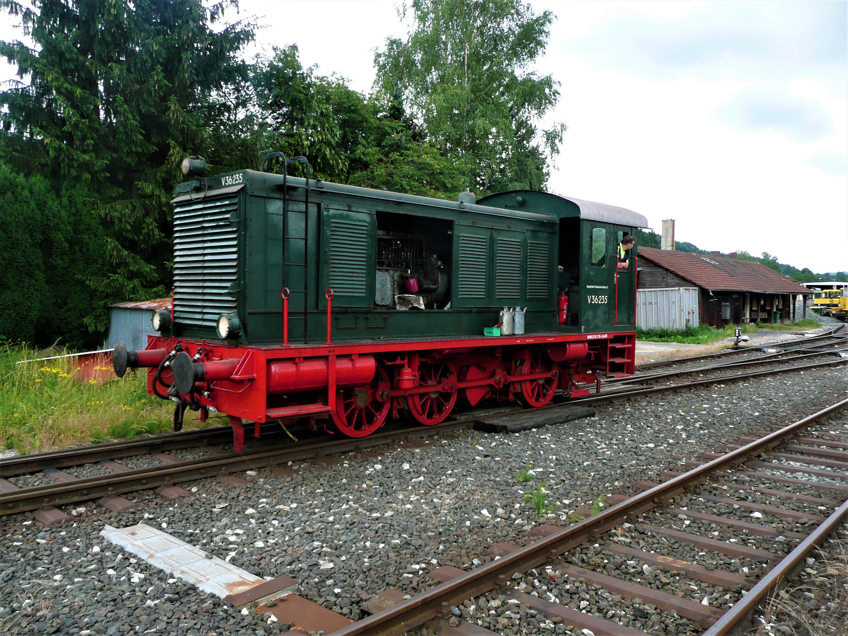 V36 235 in Ebermannstadt